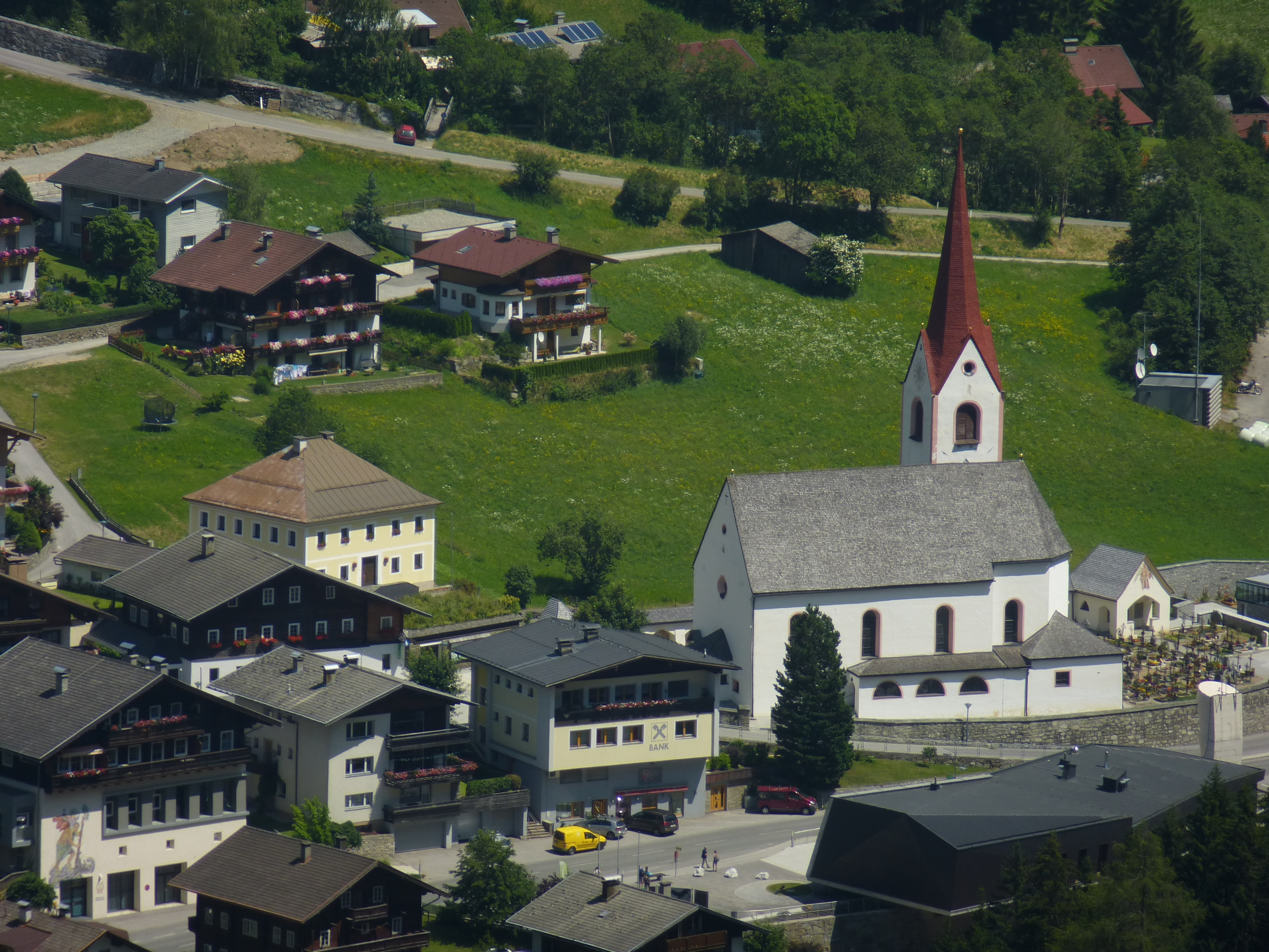 Kath. Pfarrkirche hl. Johannes von Nepomuk; Kirche samt Friedhof und Widum vom gegenüberliegenden Hang aus fotografiert